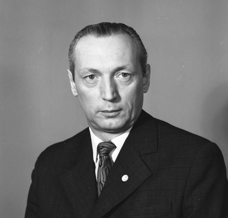 Kurt Nier Kurt Nier. Stellvertreter des Ministers für Auswärtige Angelegenheiten der DDR [Kurt Nier (Porträt)] Abgebildete Personen: Nier, Kurt: Stellvertretender Außenminister, DDR